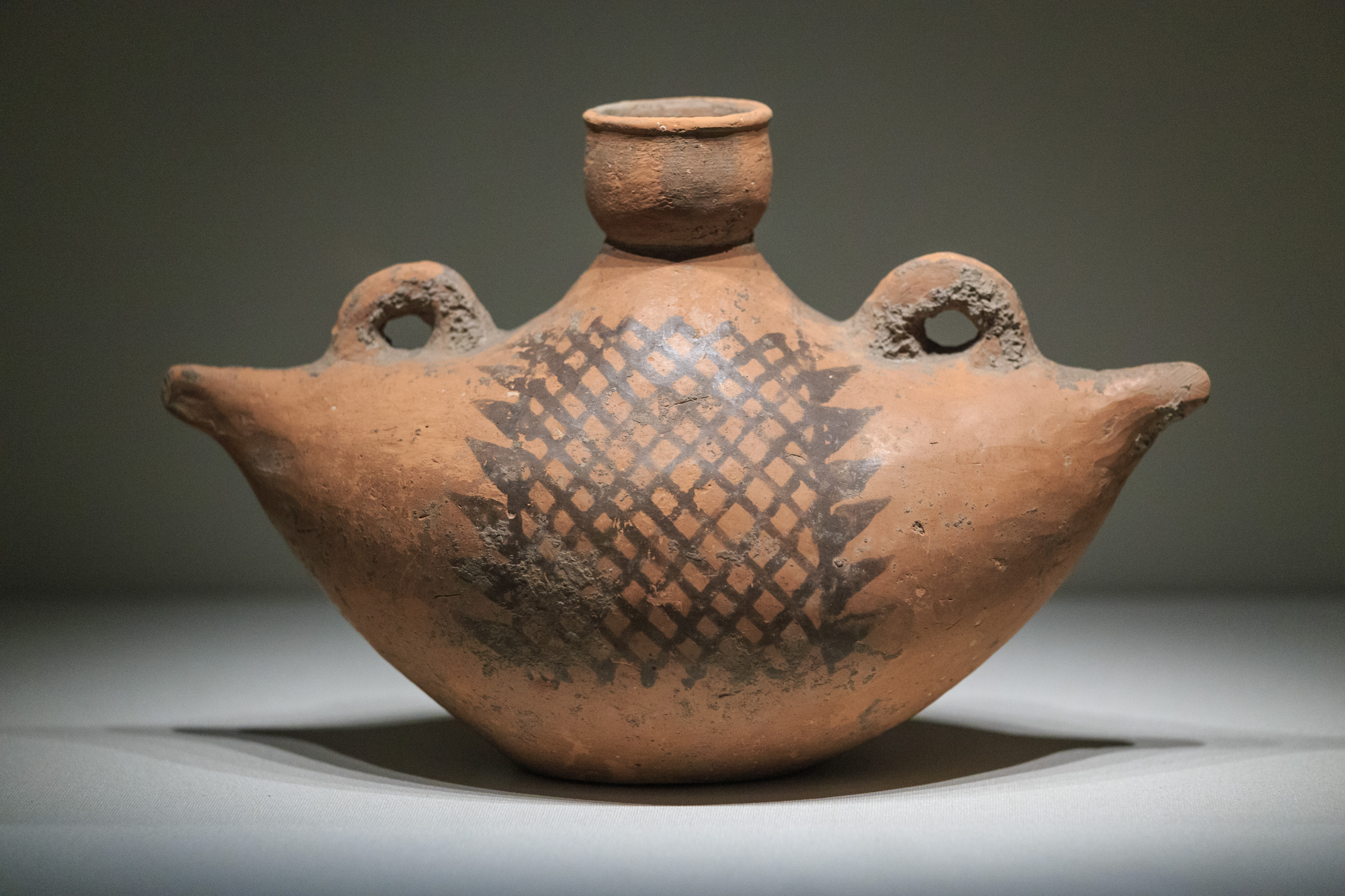 中国国家博物馆—— 船形彩陶壶，仰韶文化，1958年陕西宝鸡北首岭出土